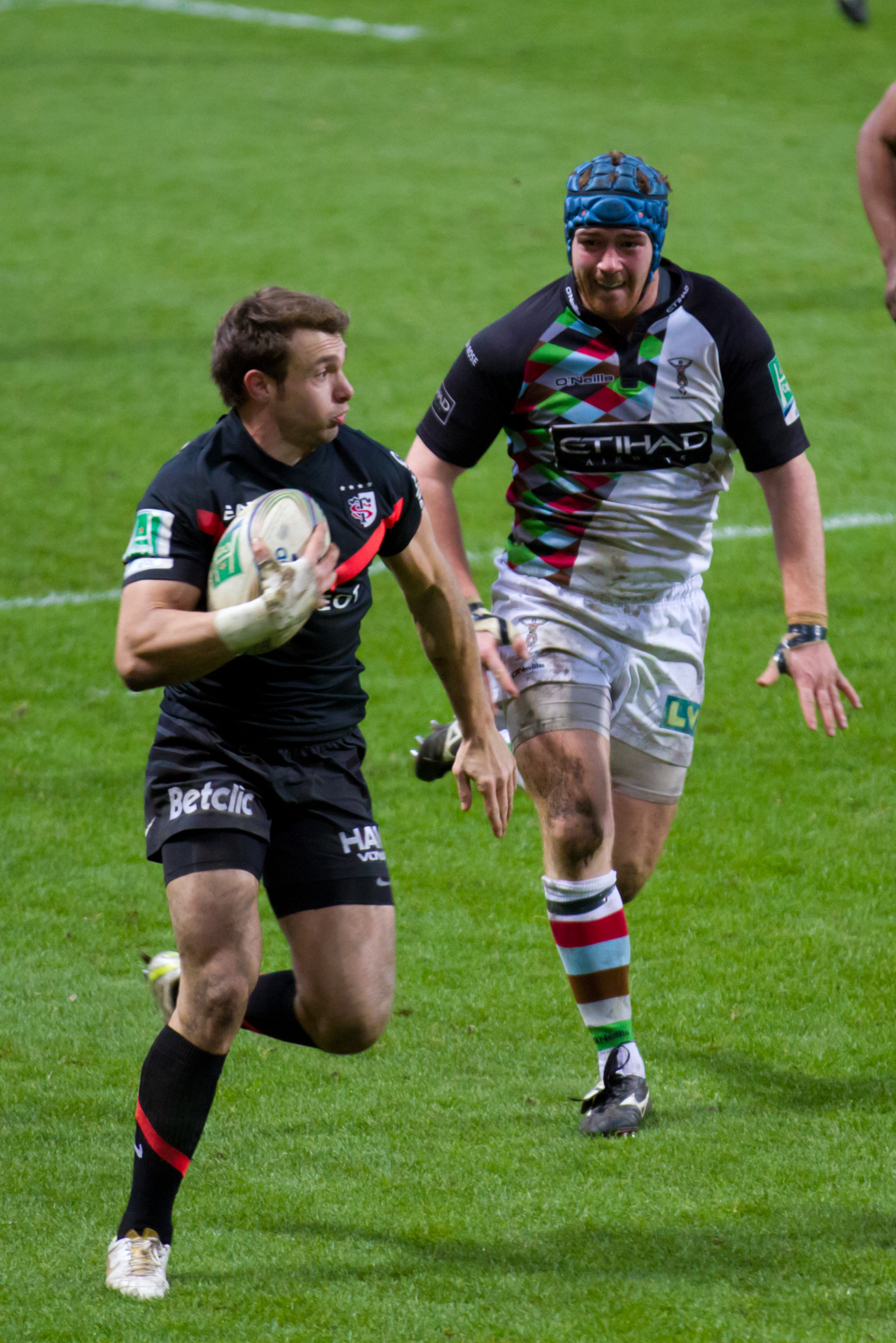 Heineken Cup 2011-2012 — 18 December 2011, Stadium. Match between: Stade toulousain — Harlequin F.C.